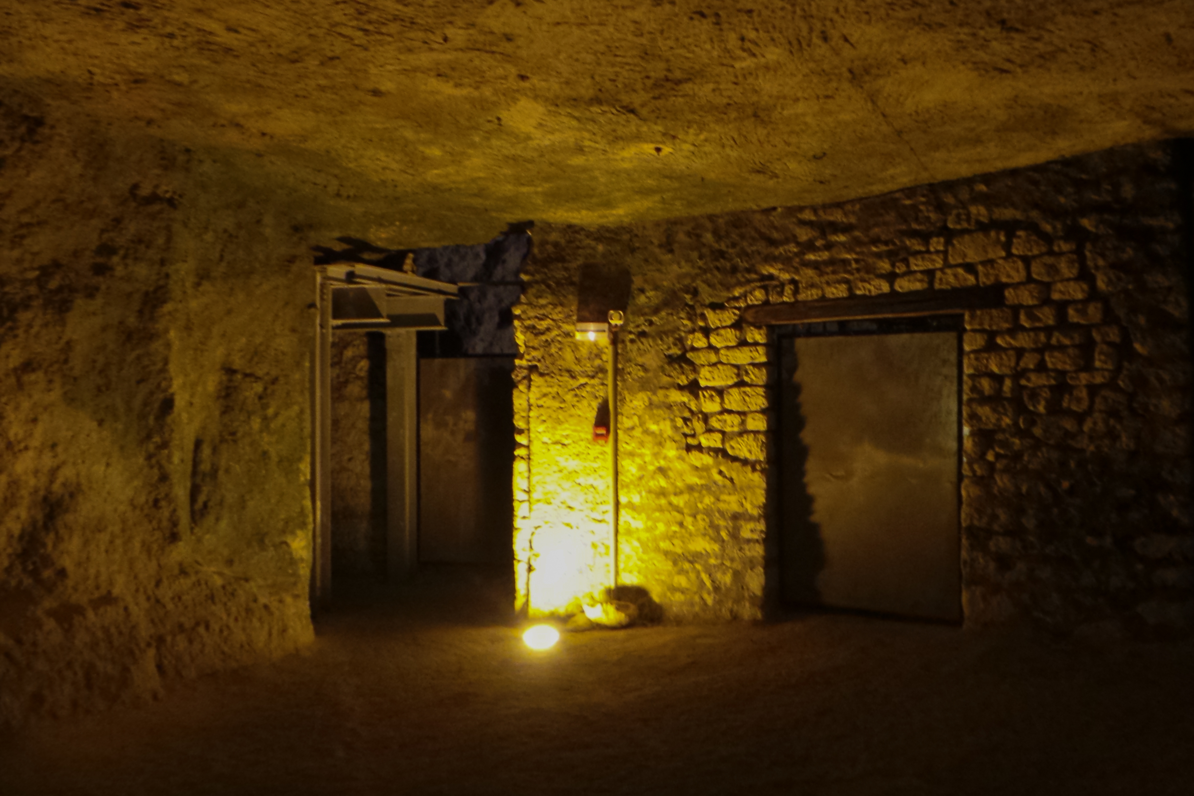 La caverne du Dragon, Chemin des Dames, commune d'Oulches-la-Vallée-Foulon, Aisnes, France